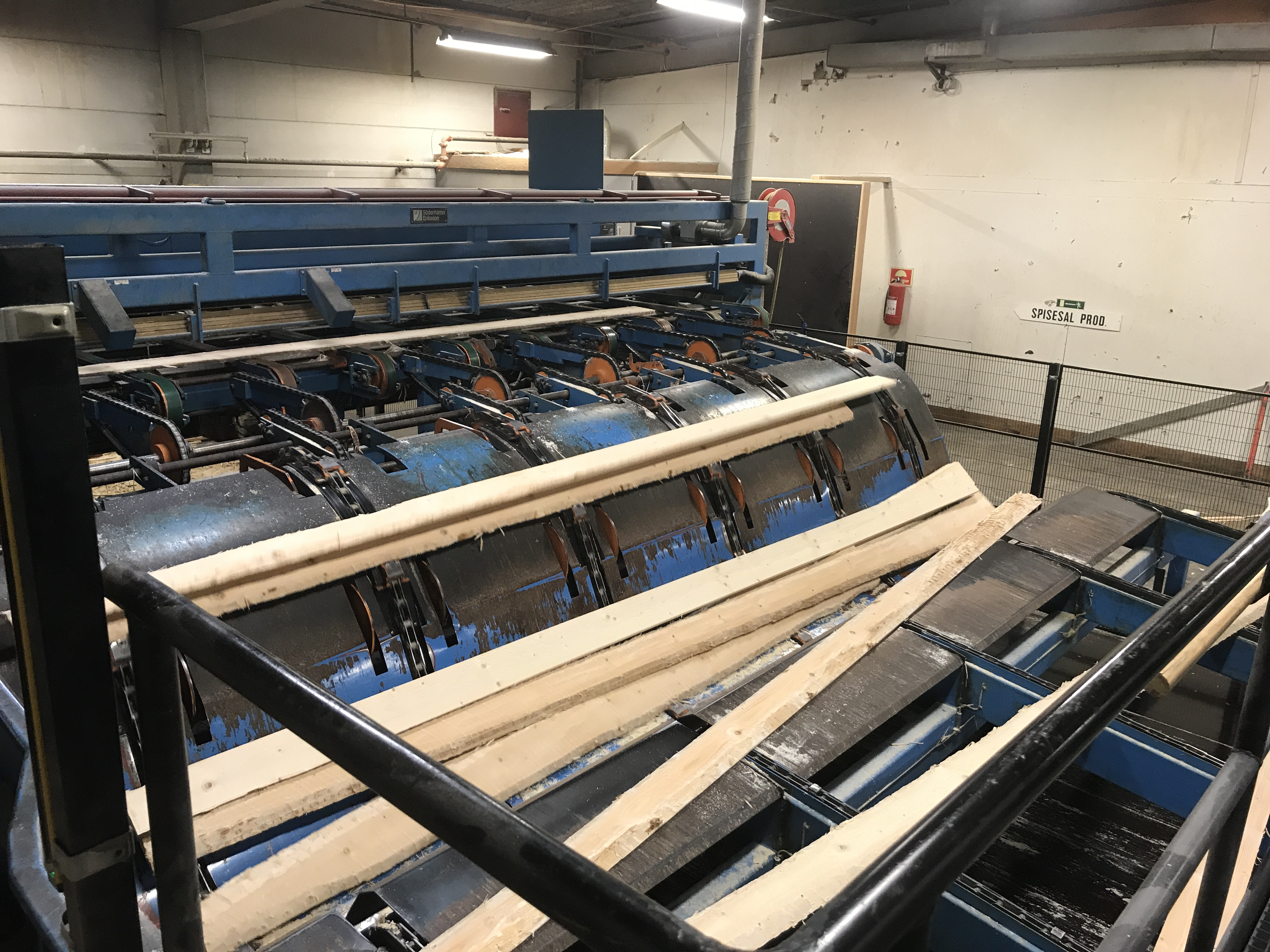 Planke, maskin, sagverk